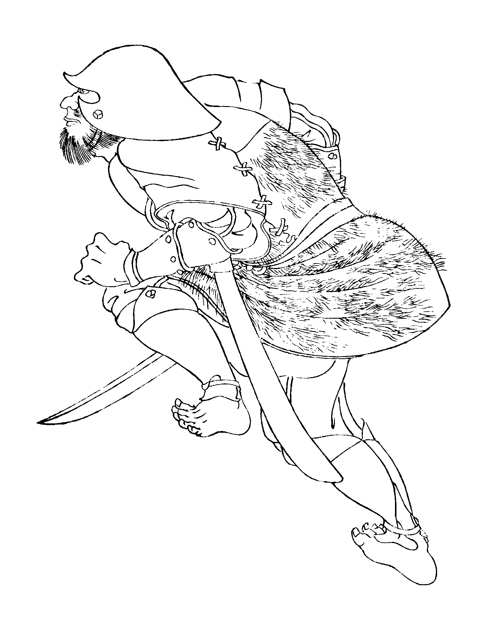 物部目